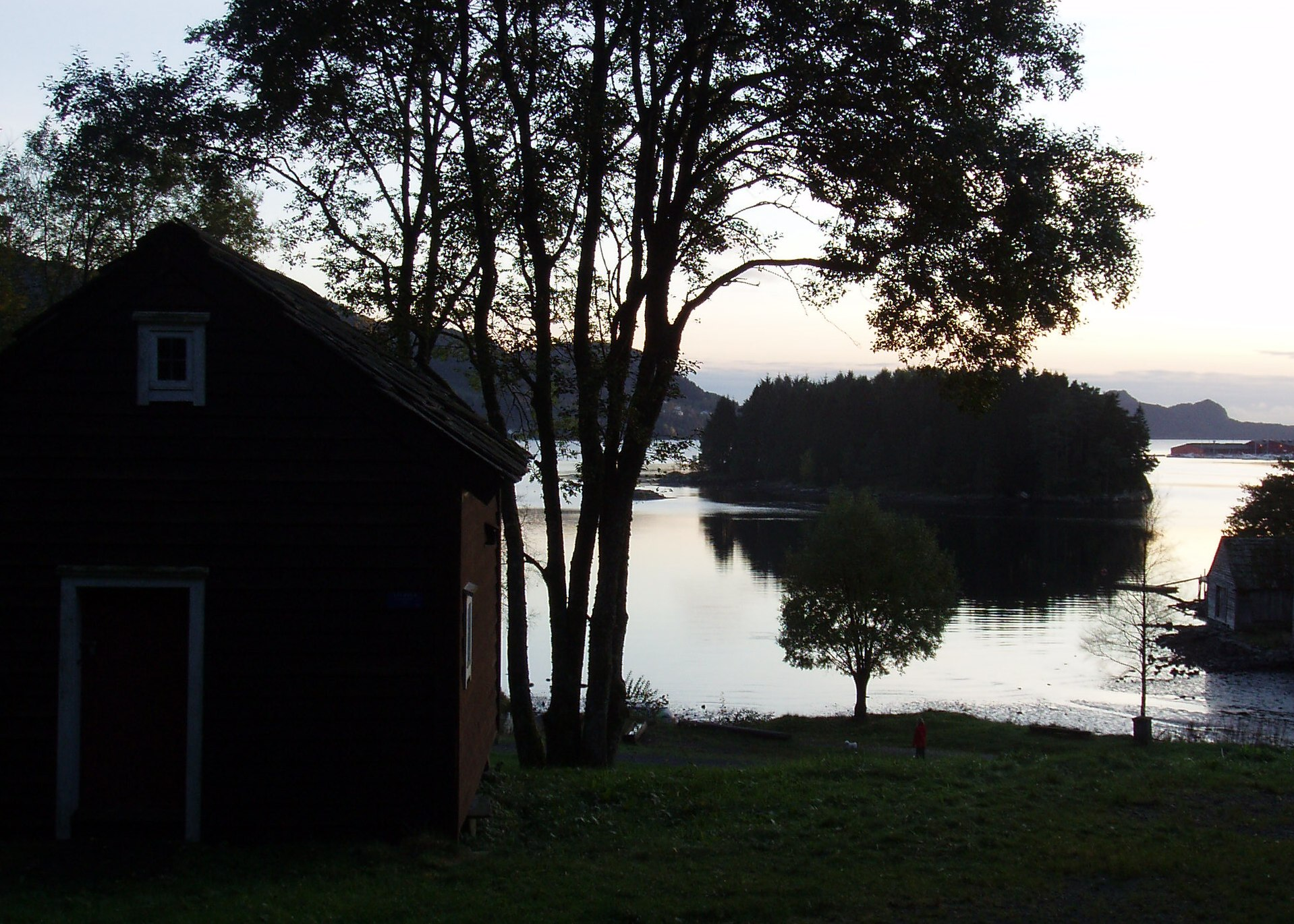 Fanafjorden at Hordamuseet in Fana, Bergen, Norway